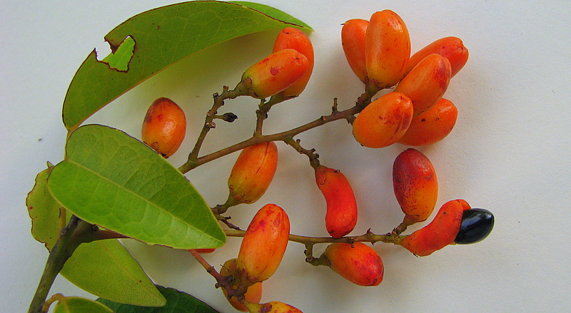 Rourea doniana Baker